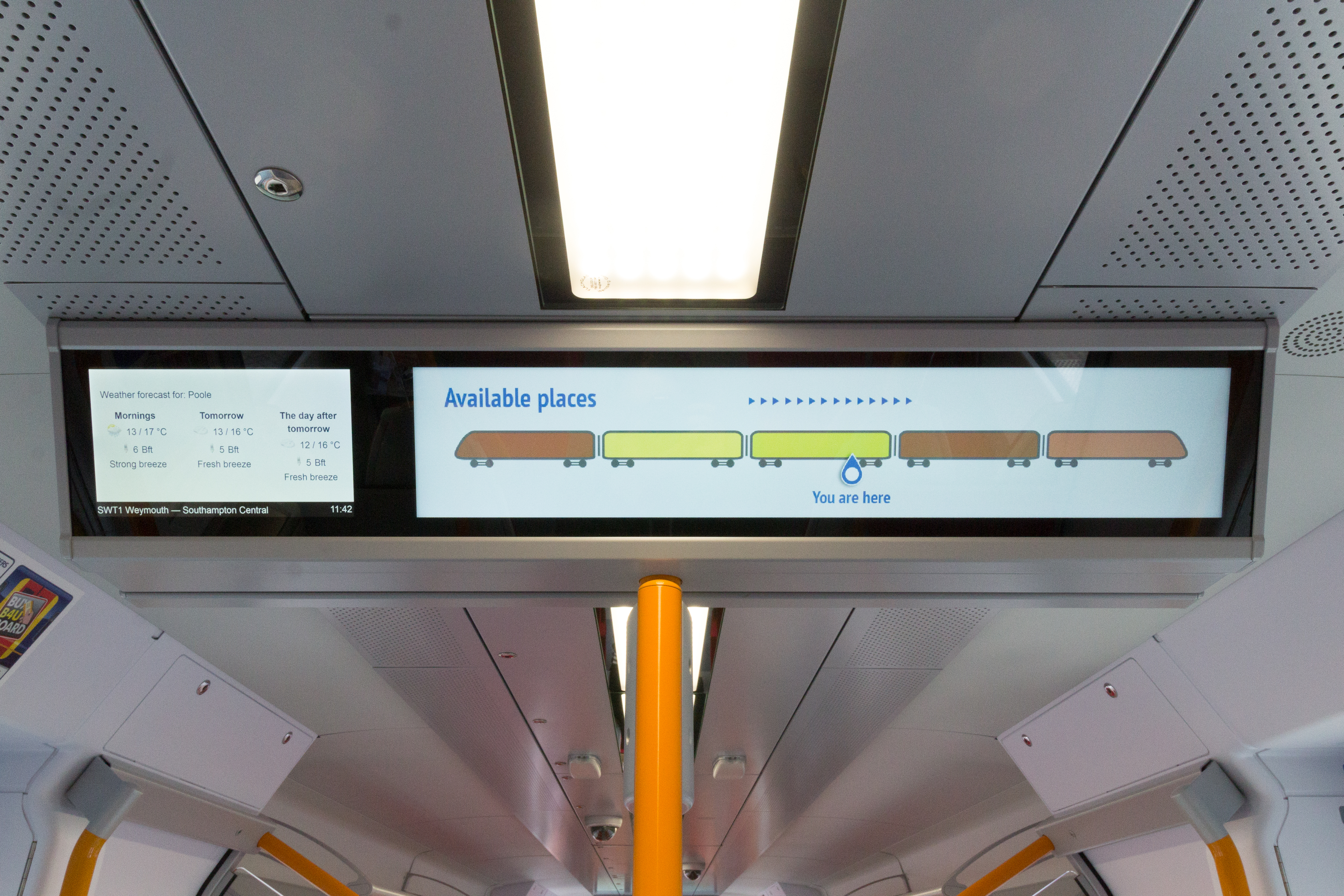 British Rail Class 707s of South West Trains - innoTrans 2016